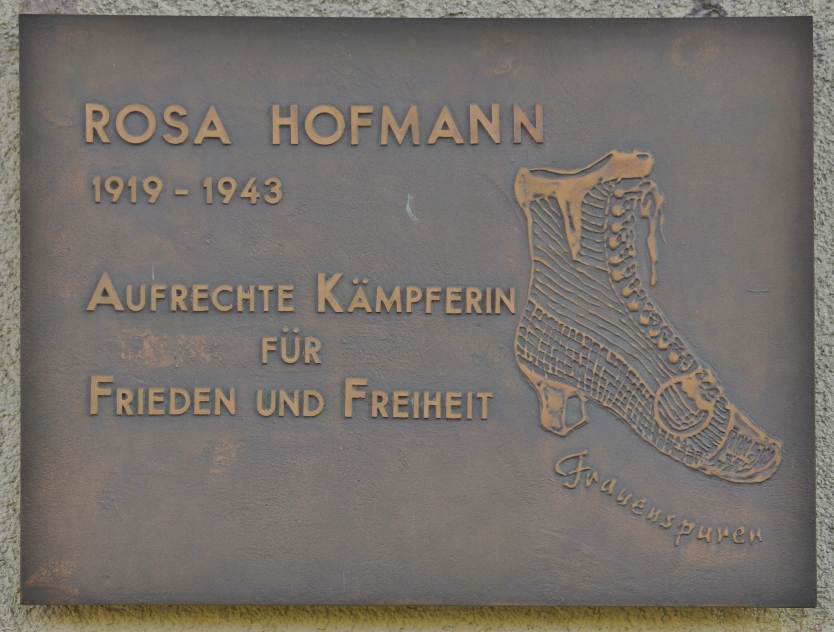 Gedenktafel Frauenspuren - Rosa Hofmann